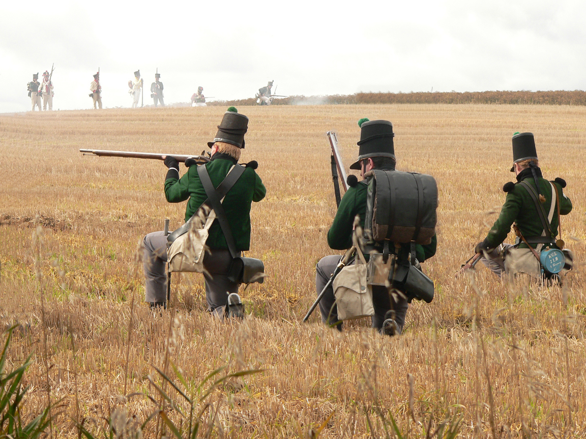 Schlacht an der Göhrde, Gefecht um Lübeln